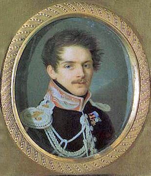 Строганов Сергей Григорьевич. Портретная миниатюра в собрании Русского музея. Кость, акварель, гуашь. 6,4*5,3 см (овал)